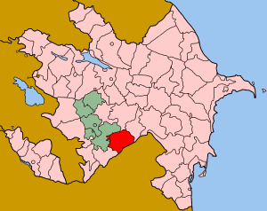 Map of Azerbaijan showing Fizuli (Füzuli) rayon.